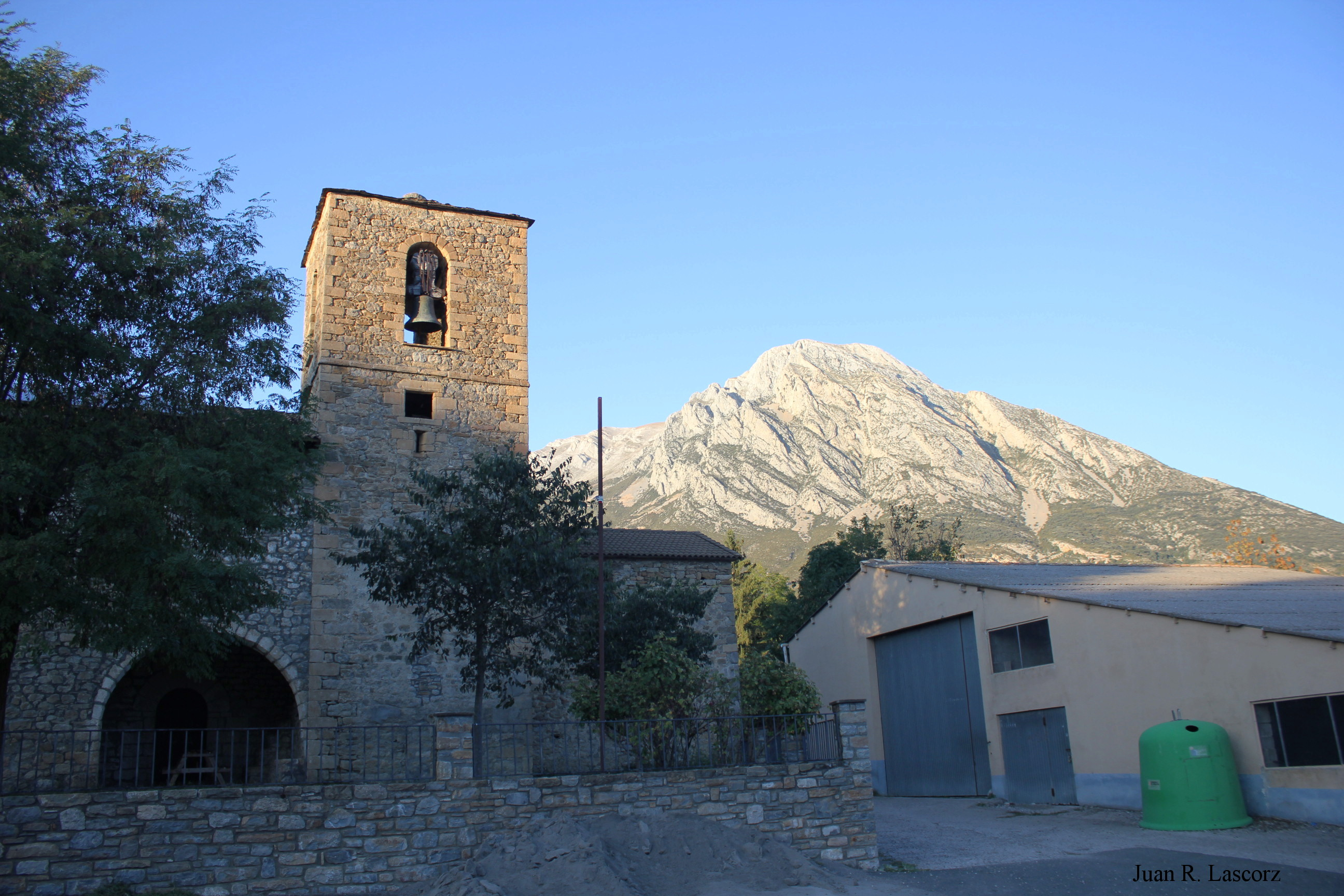 Aragonés: Eixea, capital d'el municipio de Vall de Lierp, en la Ribagorza, Uesca. La ilesia é romanica con anyadius d'el sieglo XVI, consagrada a Sant Esteban. El Turbón dezaga.